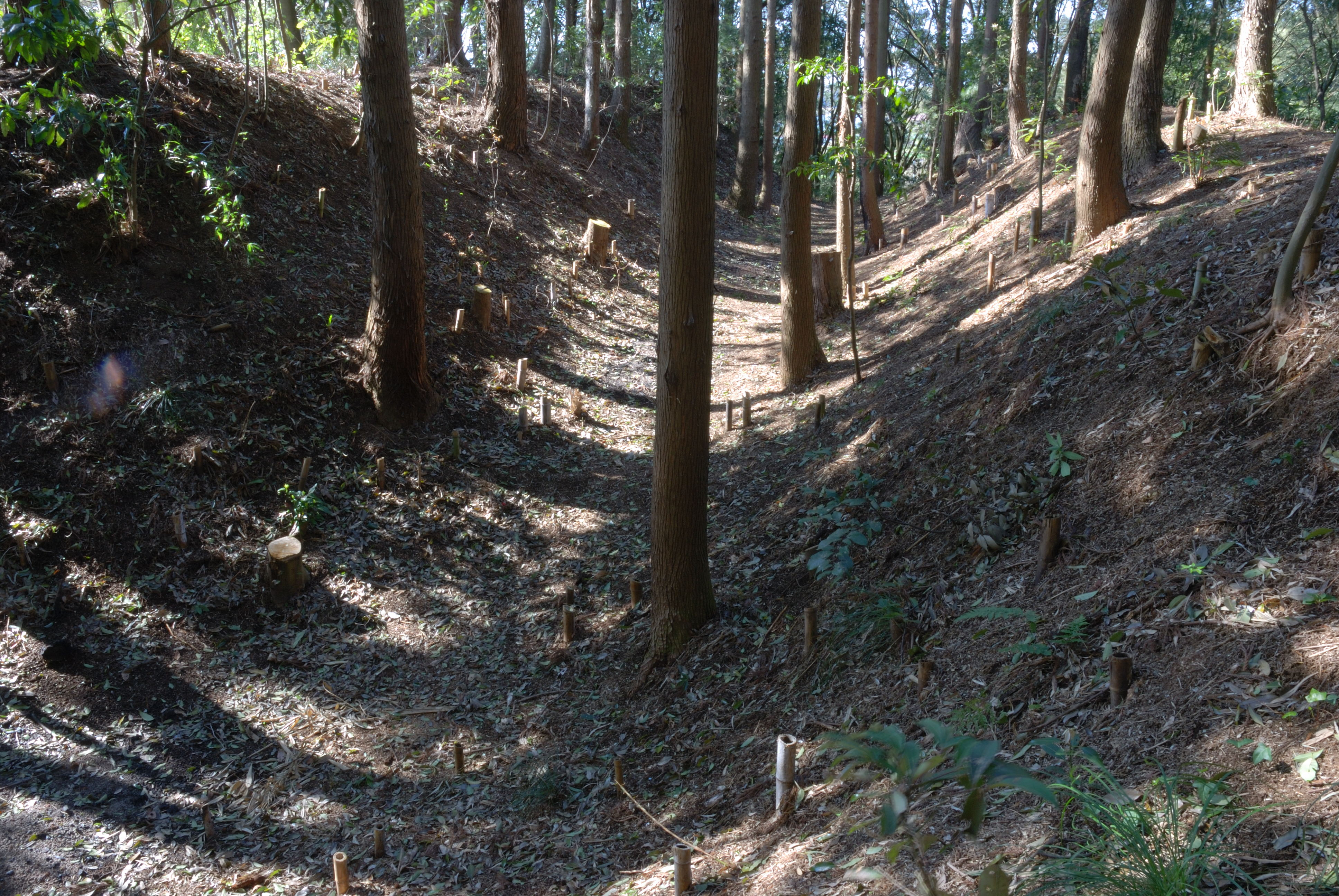 Ushiku jinya karabori